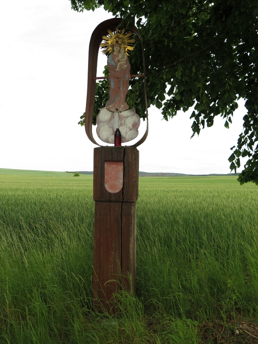 Sloup s obrazem Panny Marie Svatohorské (boží muka), u silnice na Suchdol, Občov.